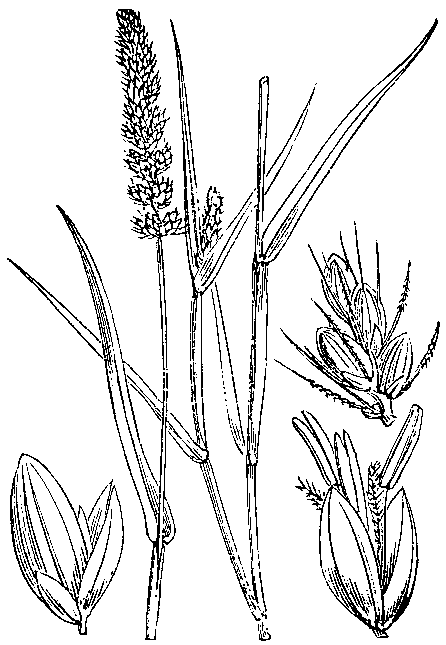 Slika 316. Vretenčasti múhvič. (Pánicum verticillátum [sic!].)